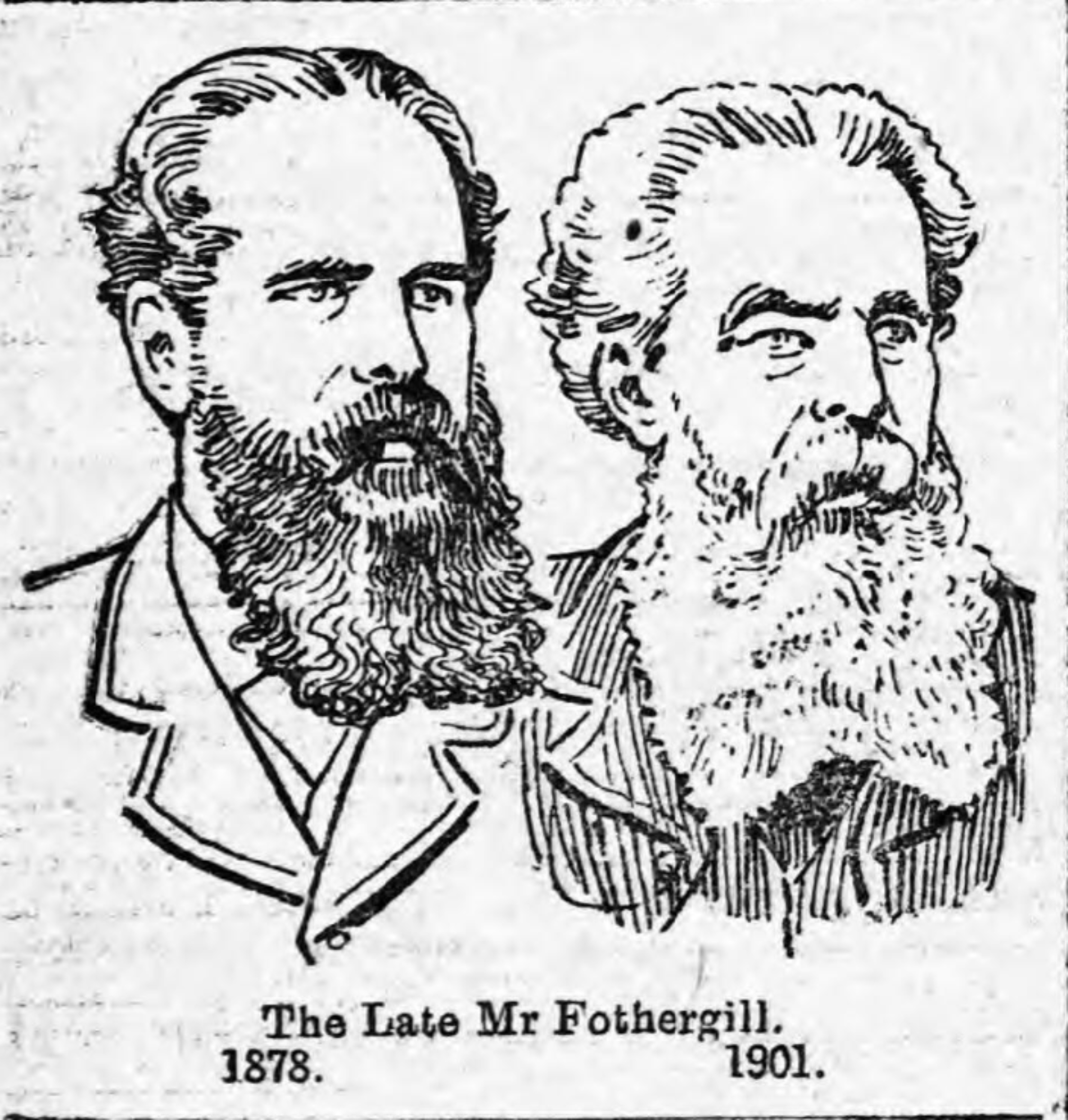 Richard Fothergill AS